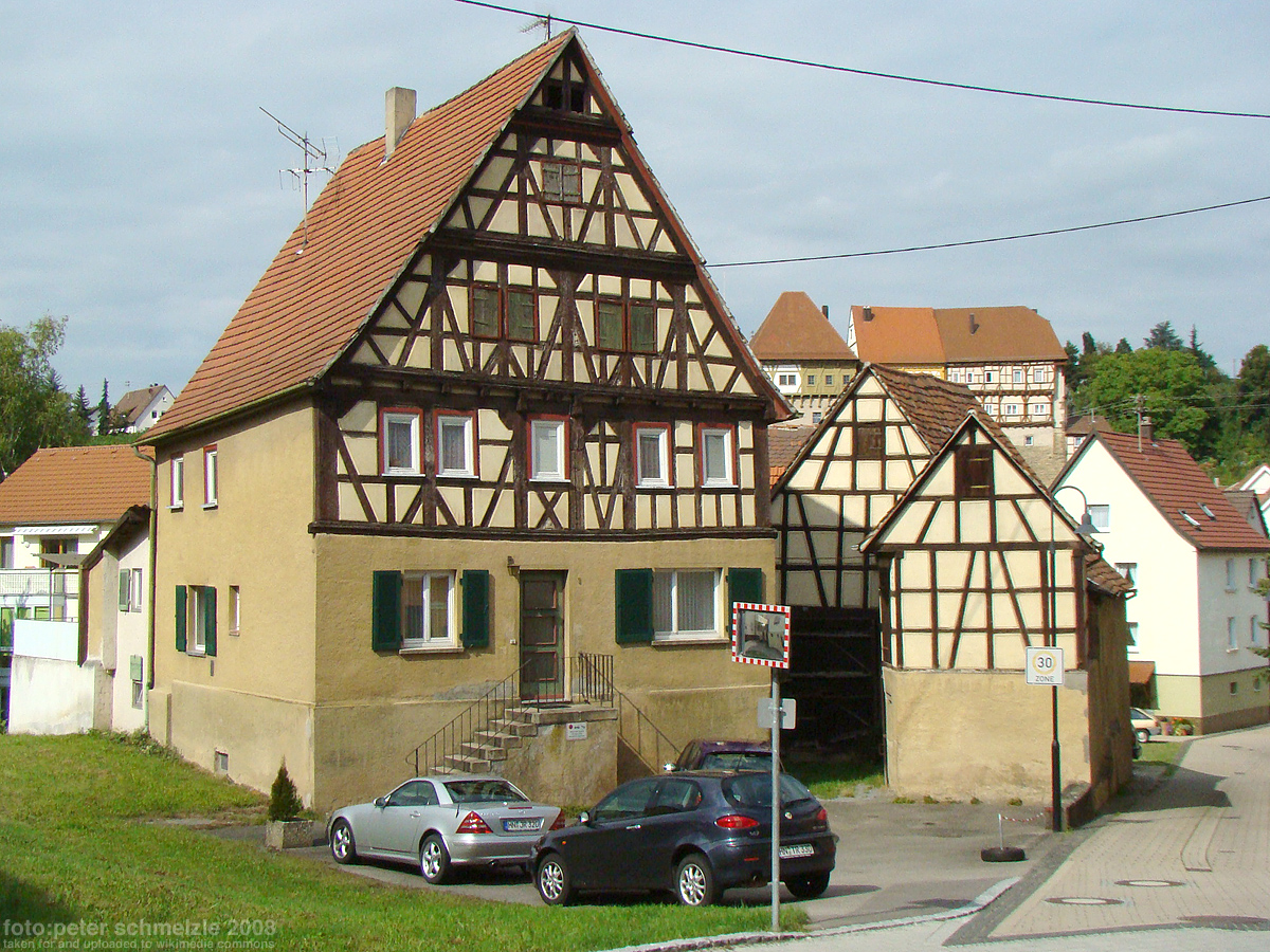 Hist. Fachwerkanwesen in Talheim (Lkr. Heilbronn)